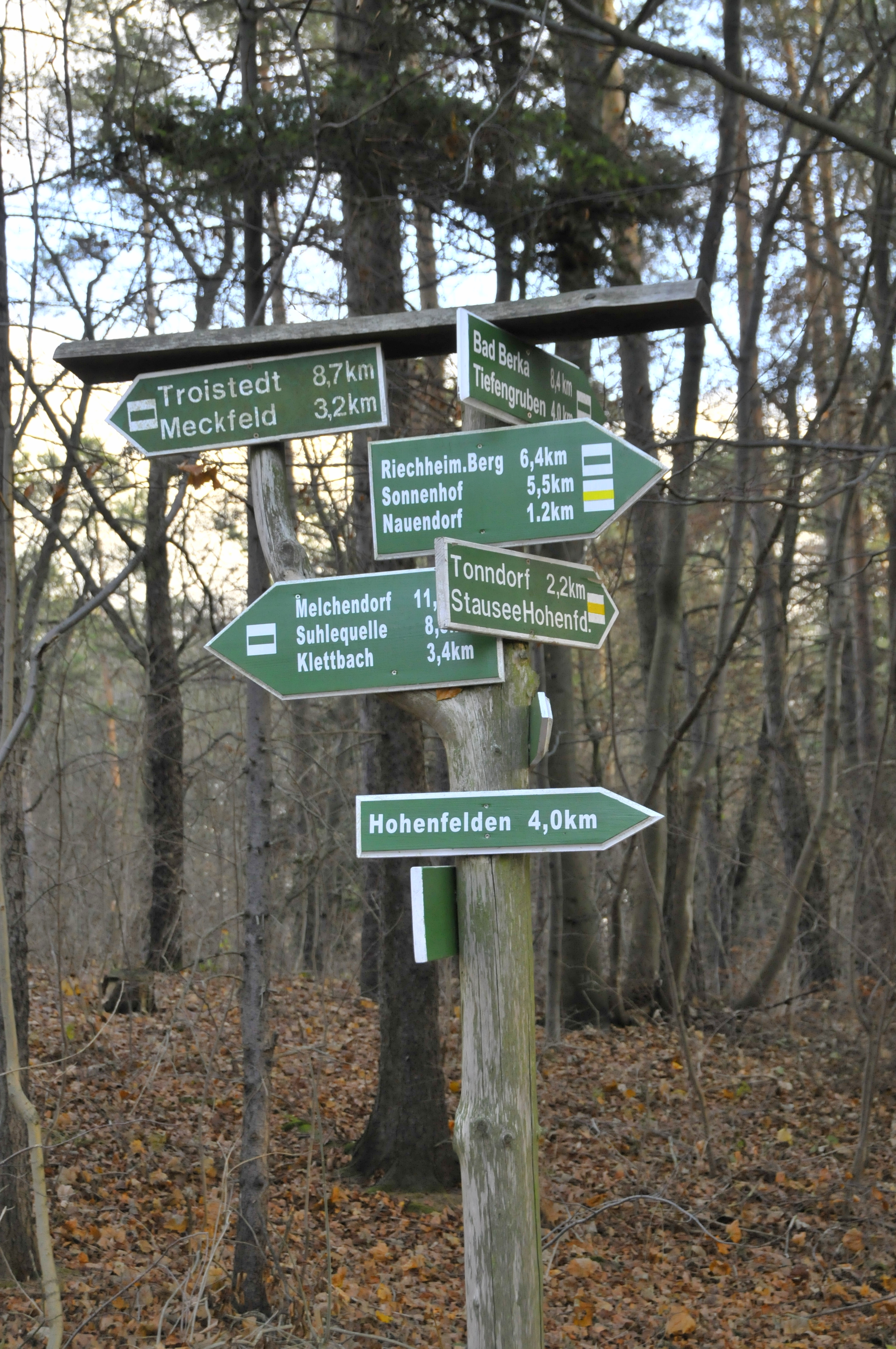 Wegweiser an der Stiefelburg